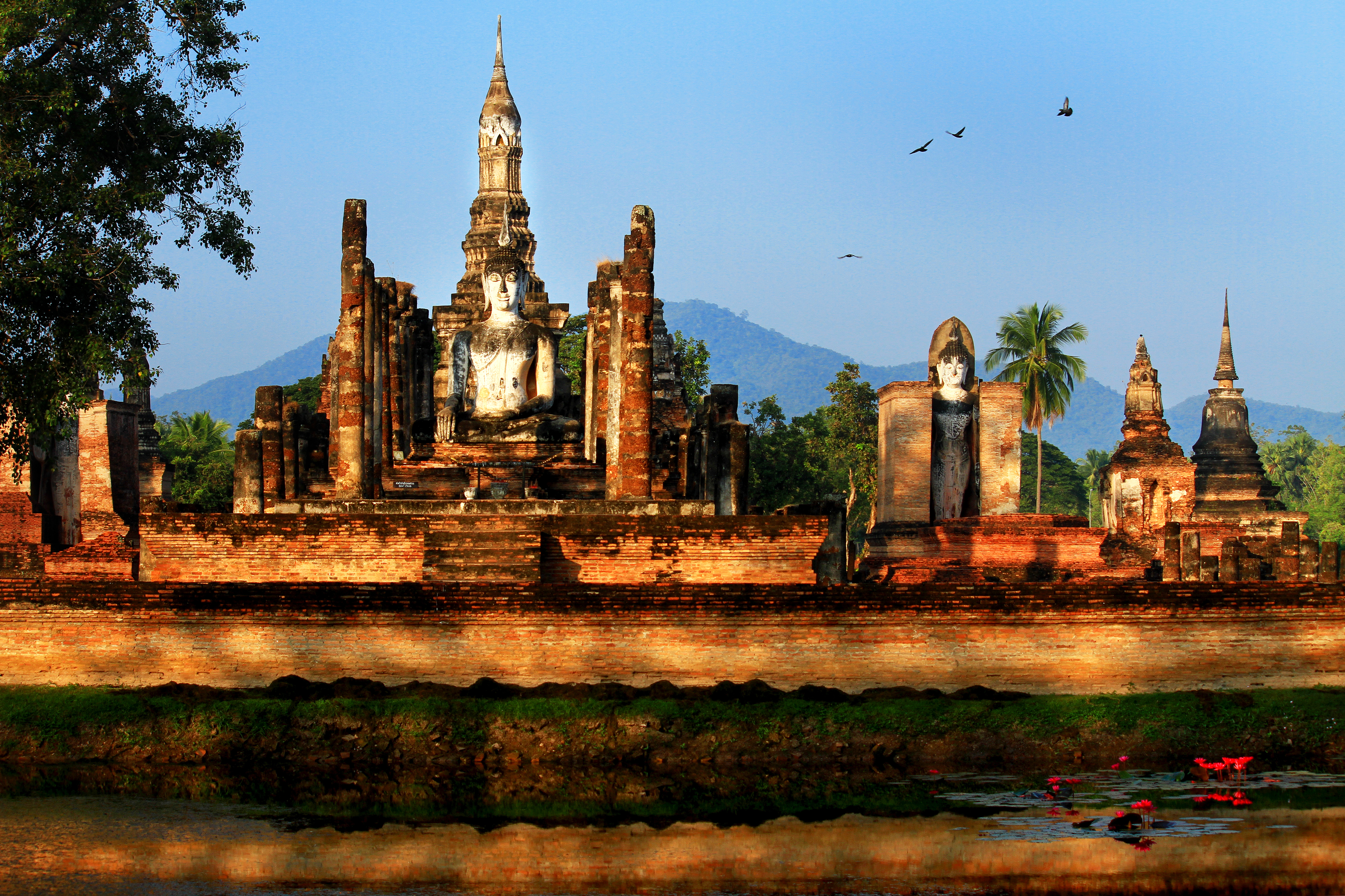 โบราณที่ทรงคุณค่าและงดงามที่อยู่กับประเทศไทยมาตั้งแต่อดีตจนถึงปัจจุบัน